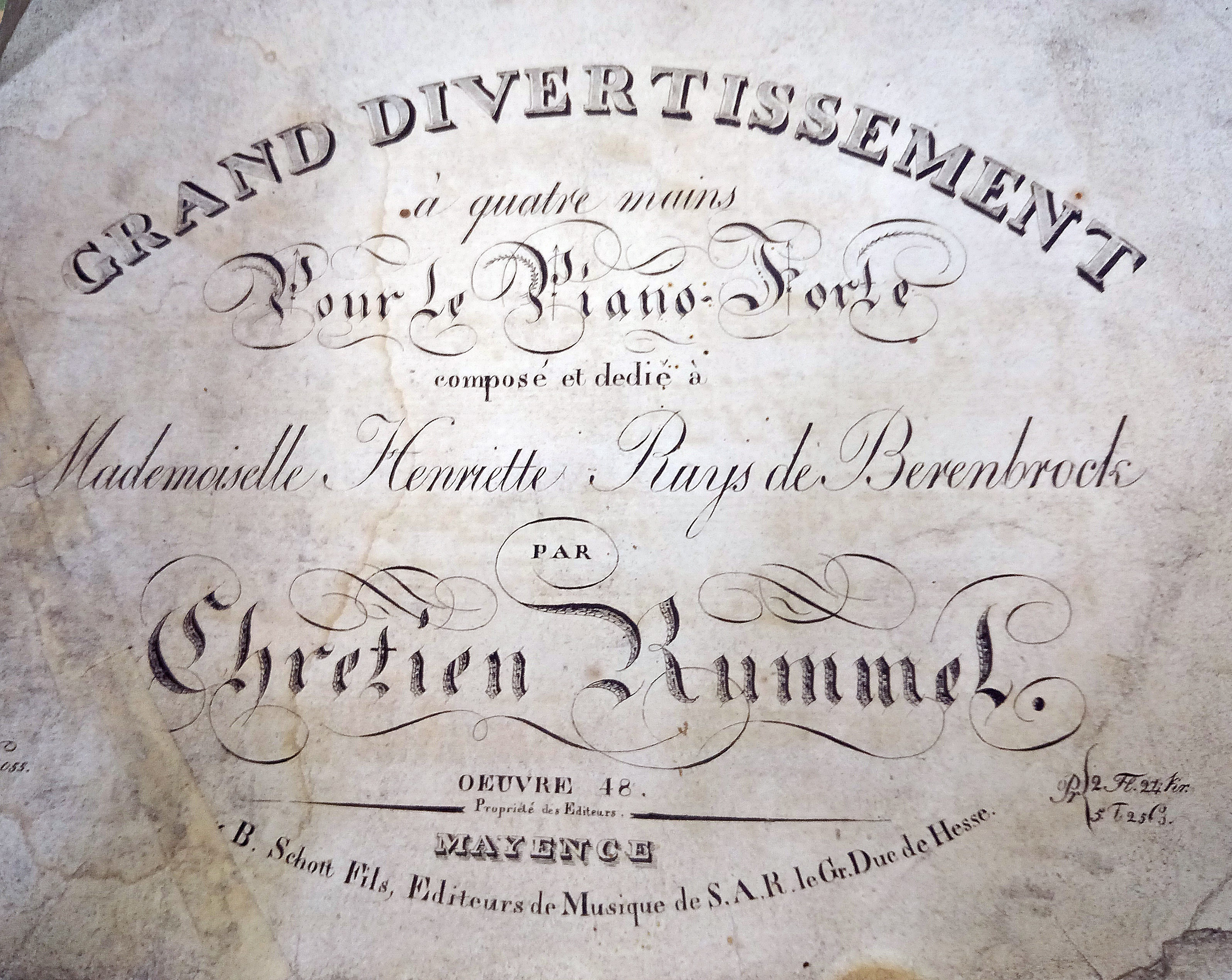 Titelblatt einer Komposition von Christian Rummel (1787-1849), um 1830